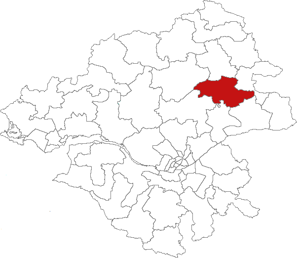 Carte de localisation du canton de Riaillé (France, Loire-Atlantique)